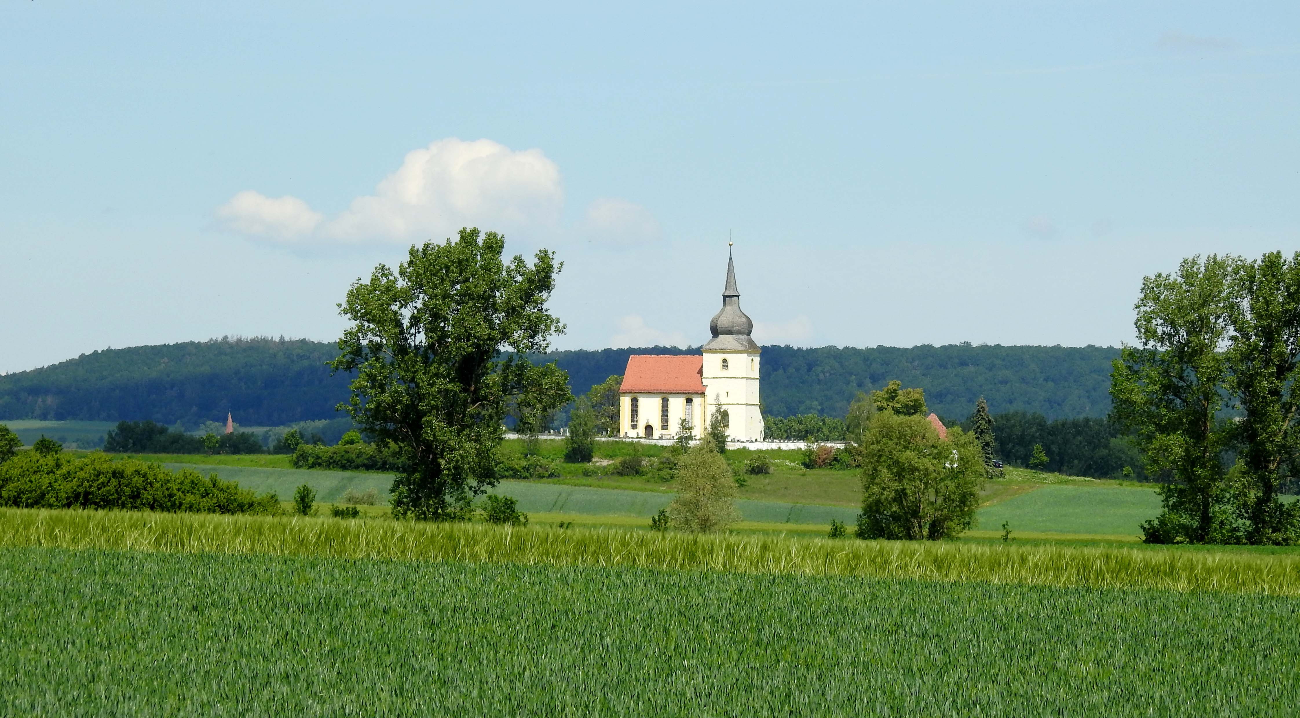 St. Michael bei Kaubenheim, Ipsheim